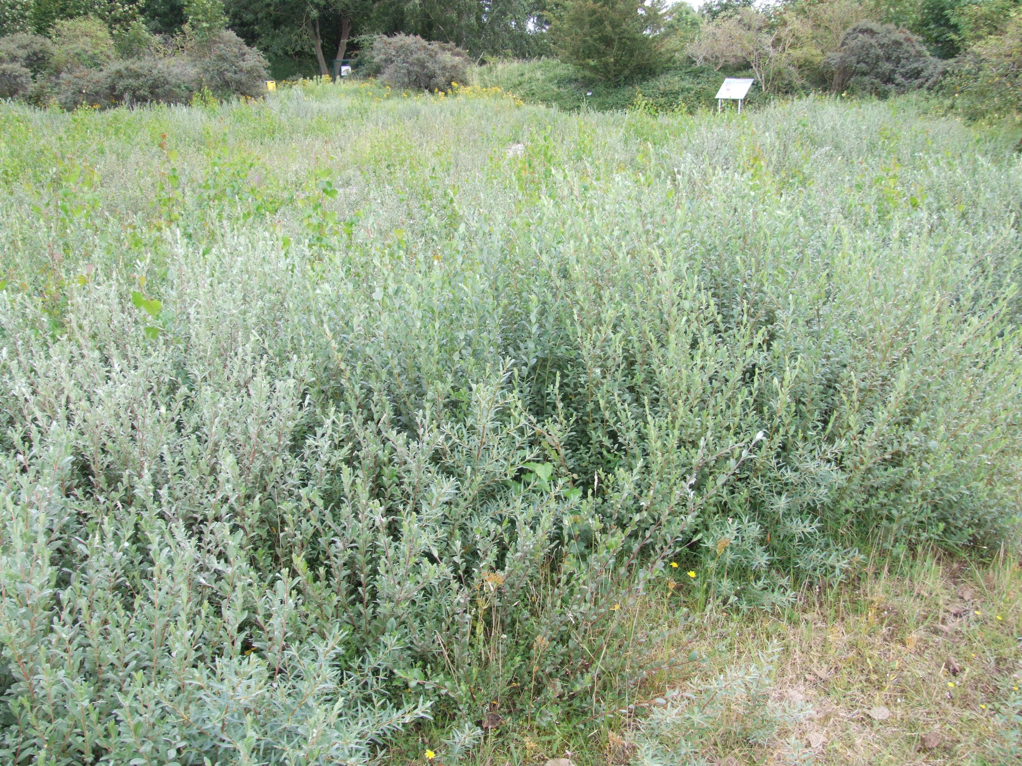 aufgenommen im Außengelände des Besucherzentrums De Nachtegaal, De Panne, Belgien, im Bereich der Oosthoekduinen